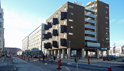 Friggagatan, Göteborg, februari 2011